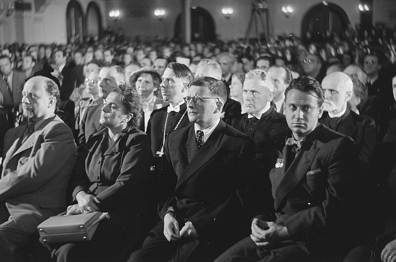 Original image description from the Deutsche Fotothek Portrait Dmitri Dmitrijewitsch Schostakowitchs sowie Walter und Lotte Ulbrichts im Publikum der Bachfeier